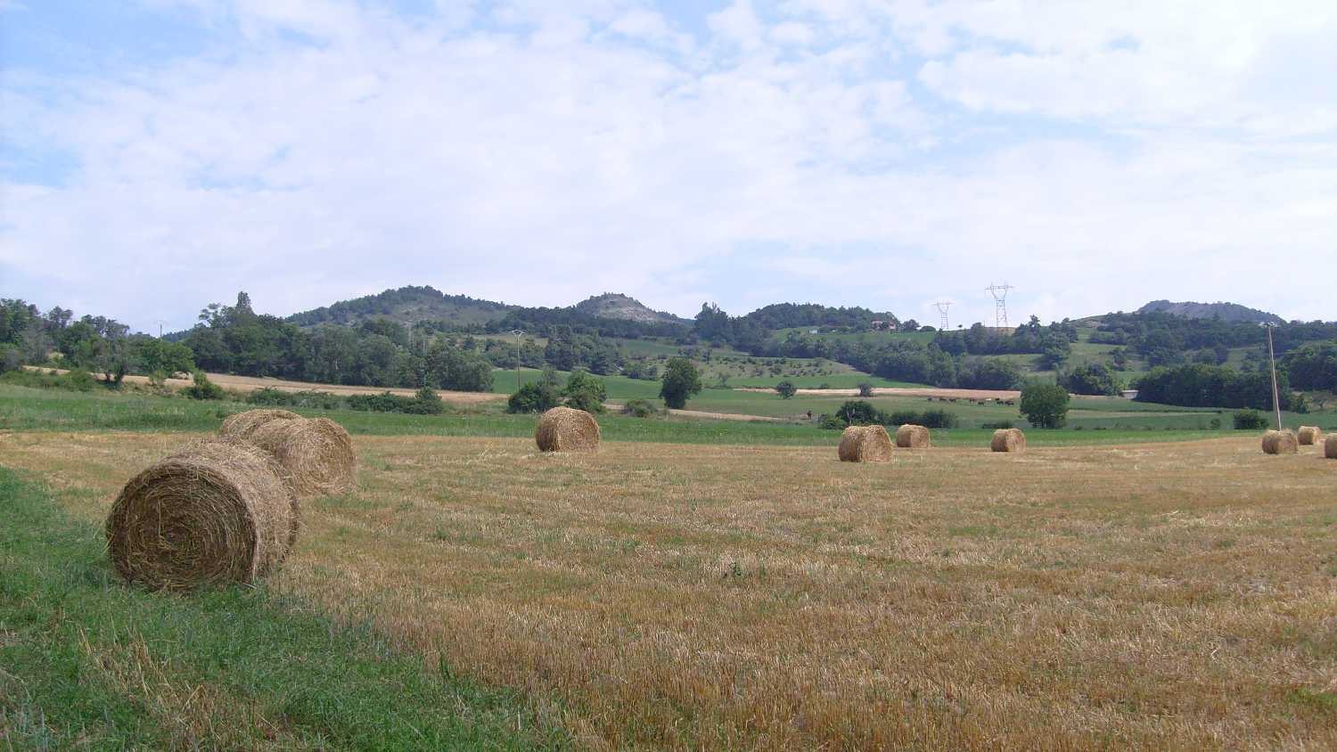 Jarjayes (Hautes-Alpes); paysage agricole de cette commune.